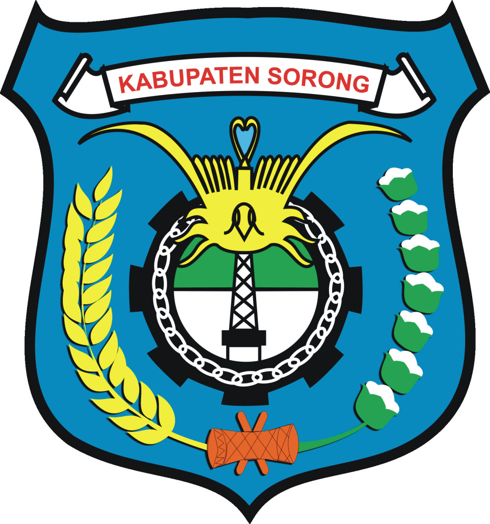 Coat of Arms (Lambang) of Regency (Kabupaten) Sorong, Provinsi Papua Barat, Indonesia